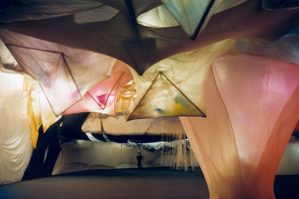 ARCOIRIS. Vista panorámica del espacio de 700m2. Centro Cultural Recoleta, año 1995. Dirección de montaje: Juan Carlos Lasser. Desarrollo cromático: María Herbin.